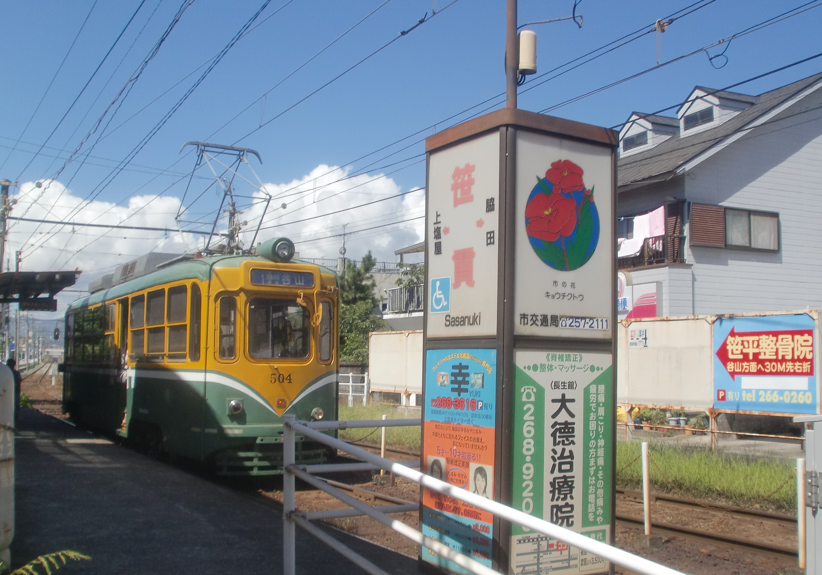 笹貫駅外観。